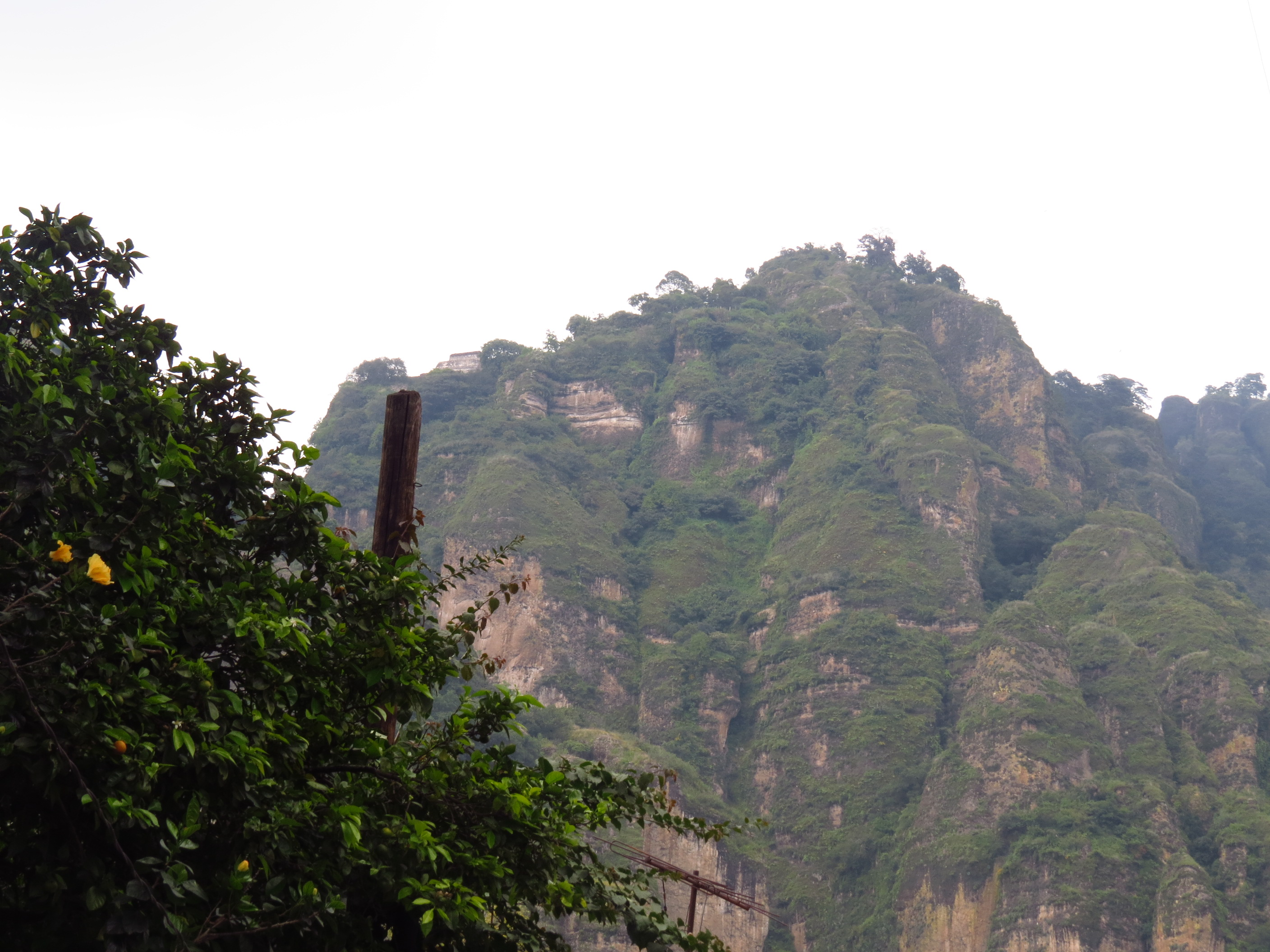 Montaña del tepozteco. Piramide del tepozteco. Tepoztlán, Morelos